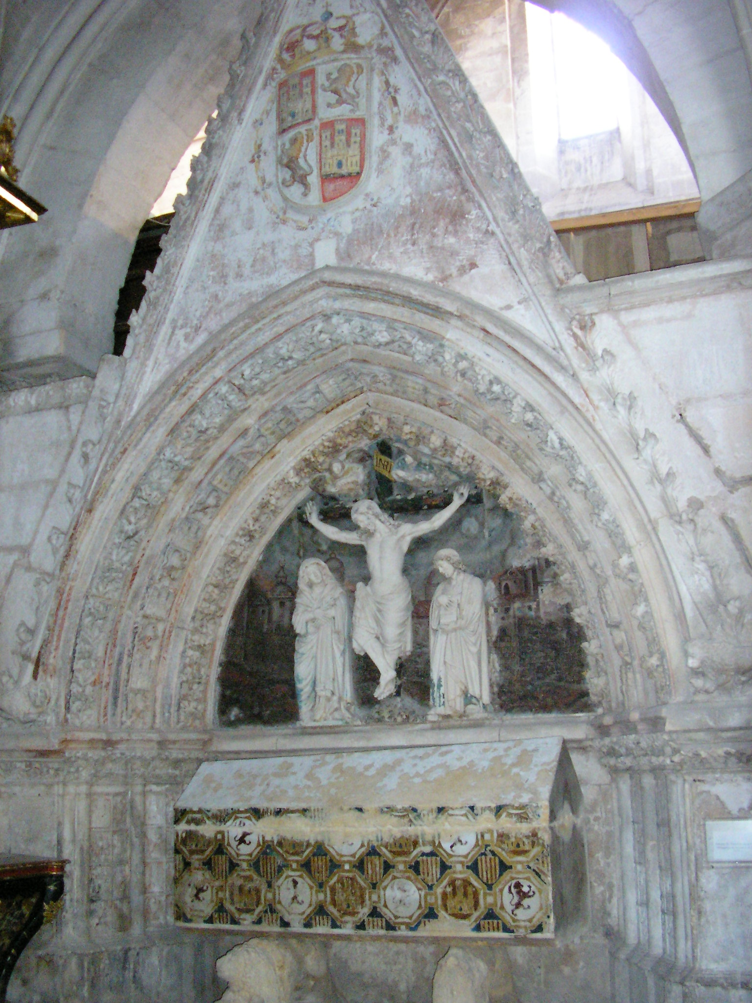 Sepulcro del infante Fernando de la Cerda (1255-1275), hijo del rey Alfonso X de Castilla y de la reina Violante de Aragón. El sepulcro se encuentra en el monasterio de las Huelgas de Burgos, y en el mismo monasterio se encuentra el sepulcro de su hijo, Alfonso de la Cerda «el Desheredado».